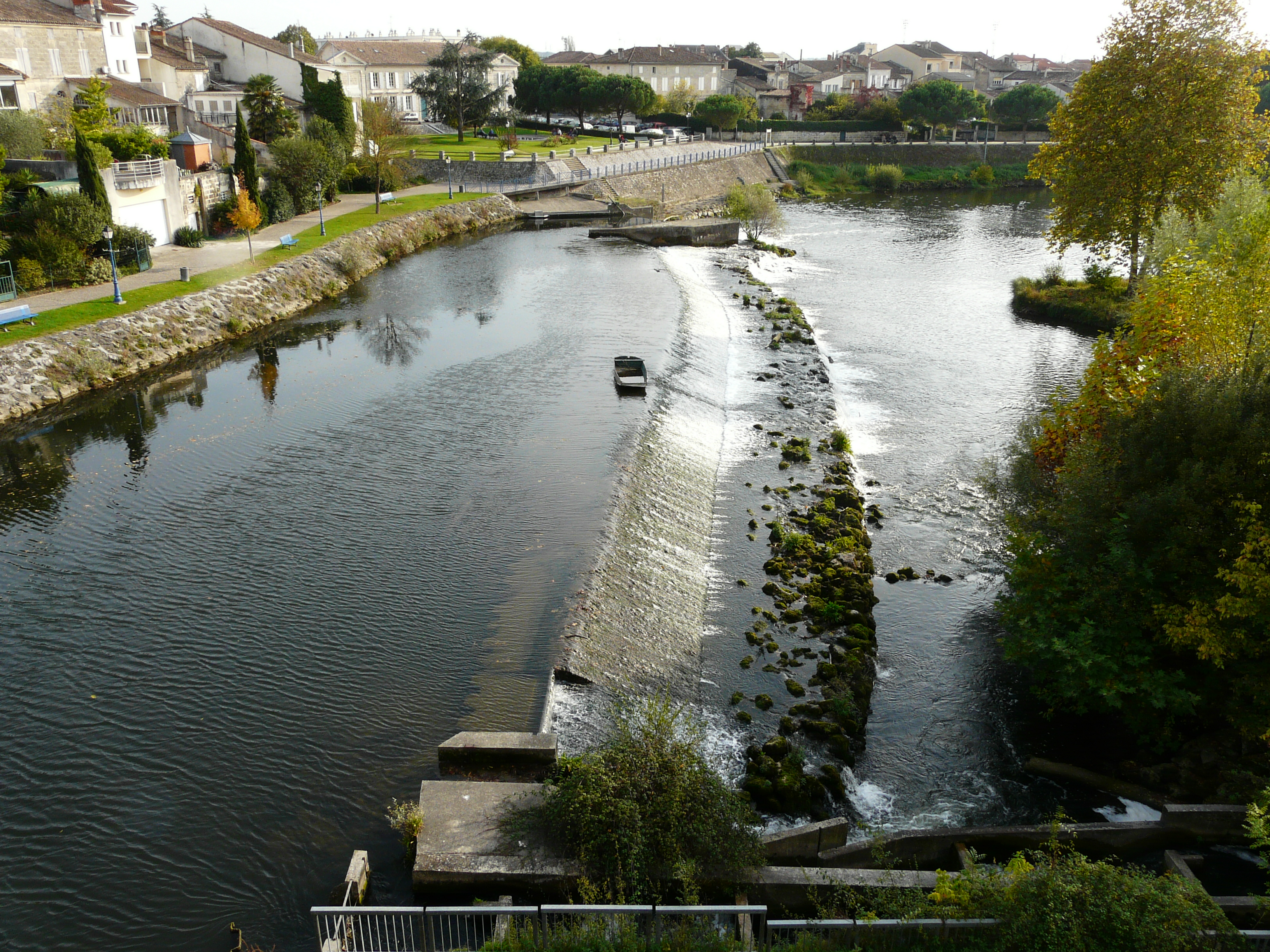 La Dronne à Coutras, Gironde, France